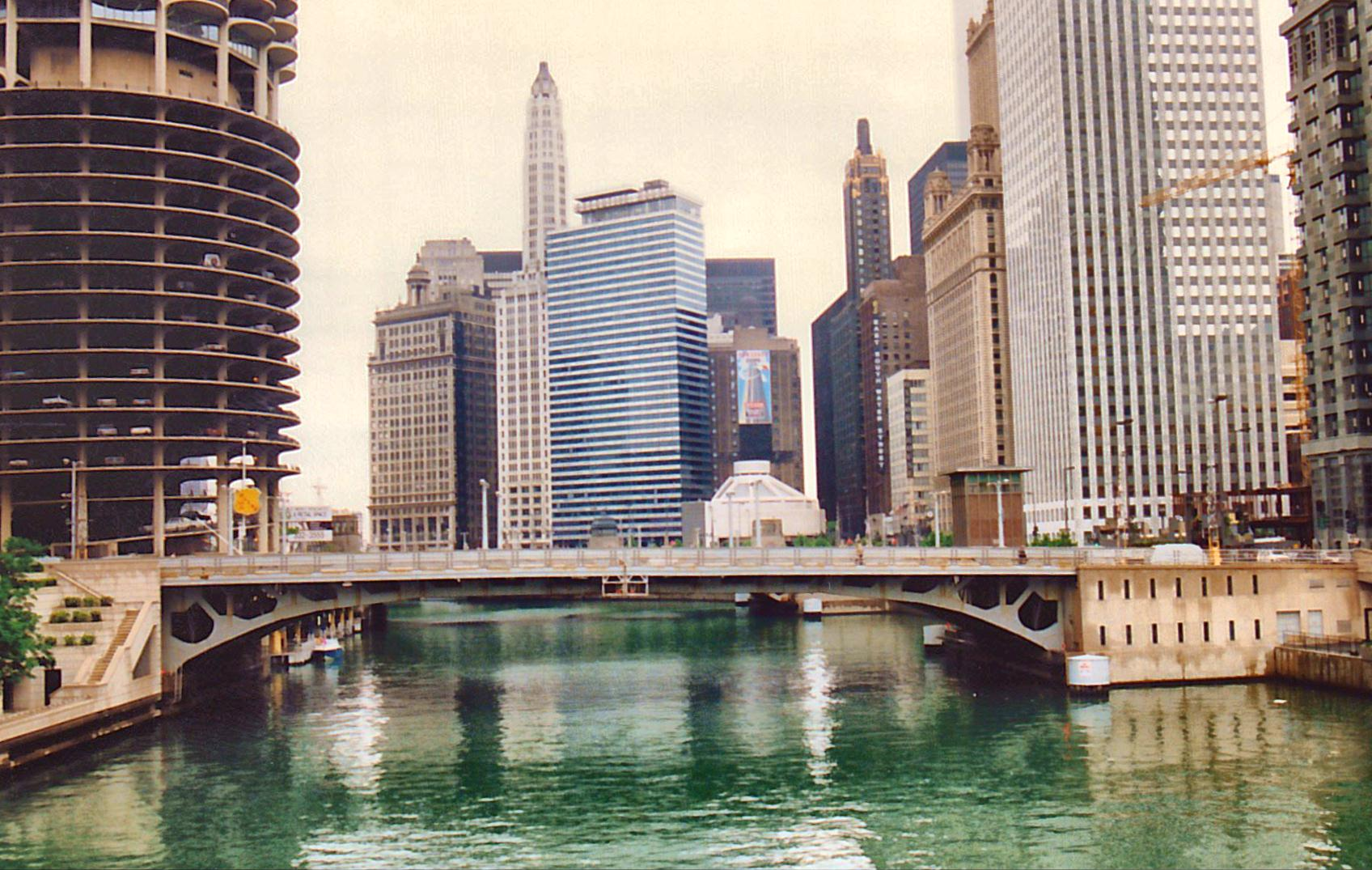 Chicago,Illinois,USA.